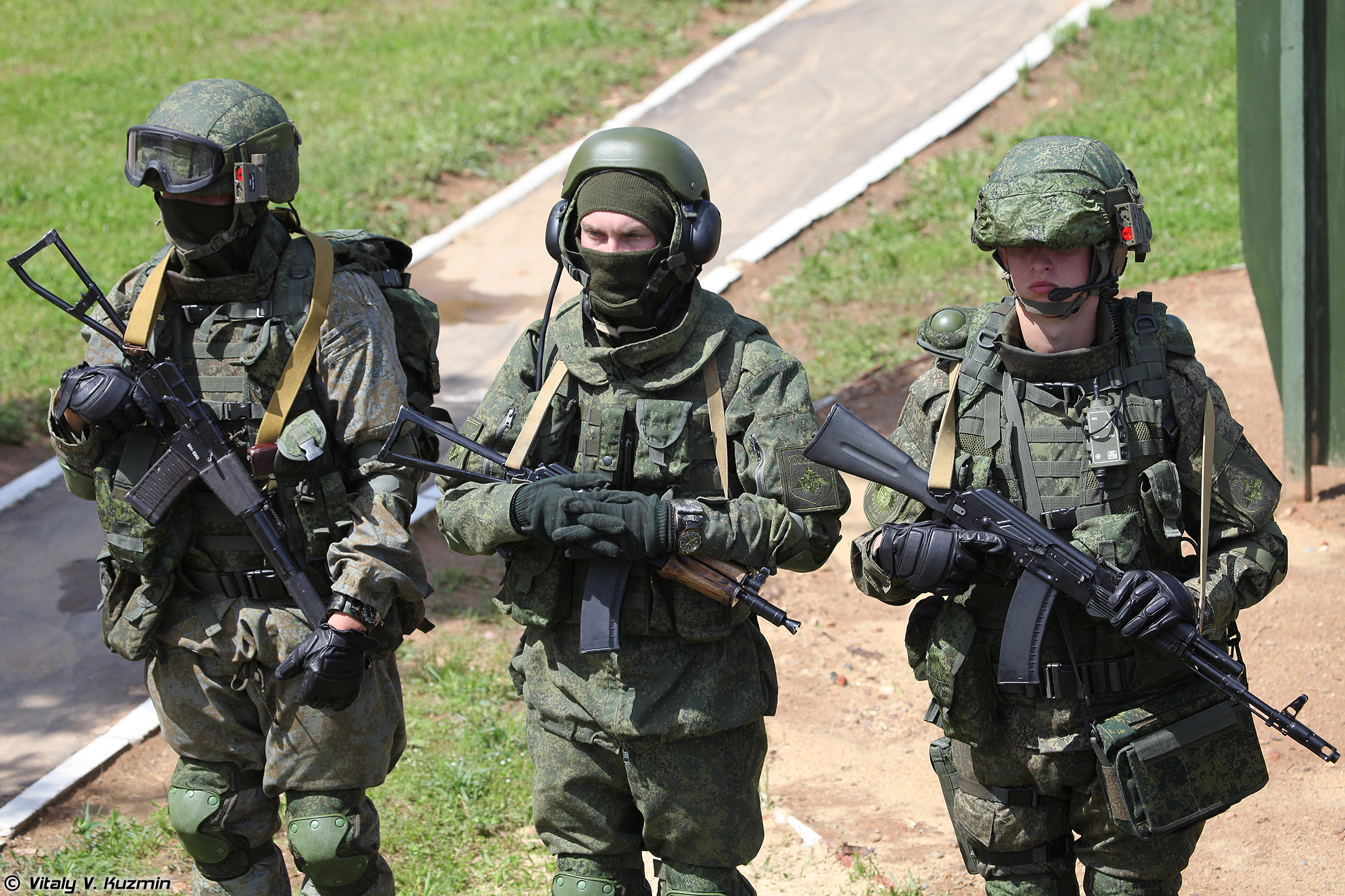 Комплект боевой экипировки Ратник в вариантах для разведчика и с КРУС Стрелец и защитный комплект для экипажей бронированных машин 6Б48 Ратник-ЗК (Ratnik infantry combat system in two variants one for recon and the second with KRUS Strelets intelligence, control and communications system and AFV crew individual protection kit 6B48 Ratnik-ZK)